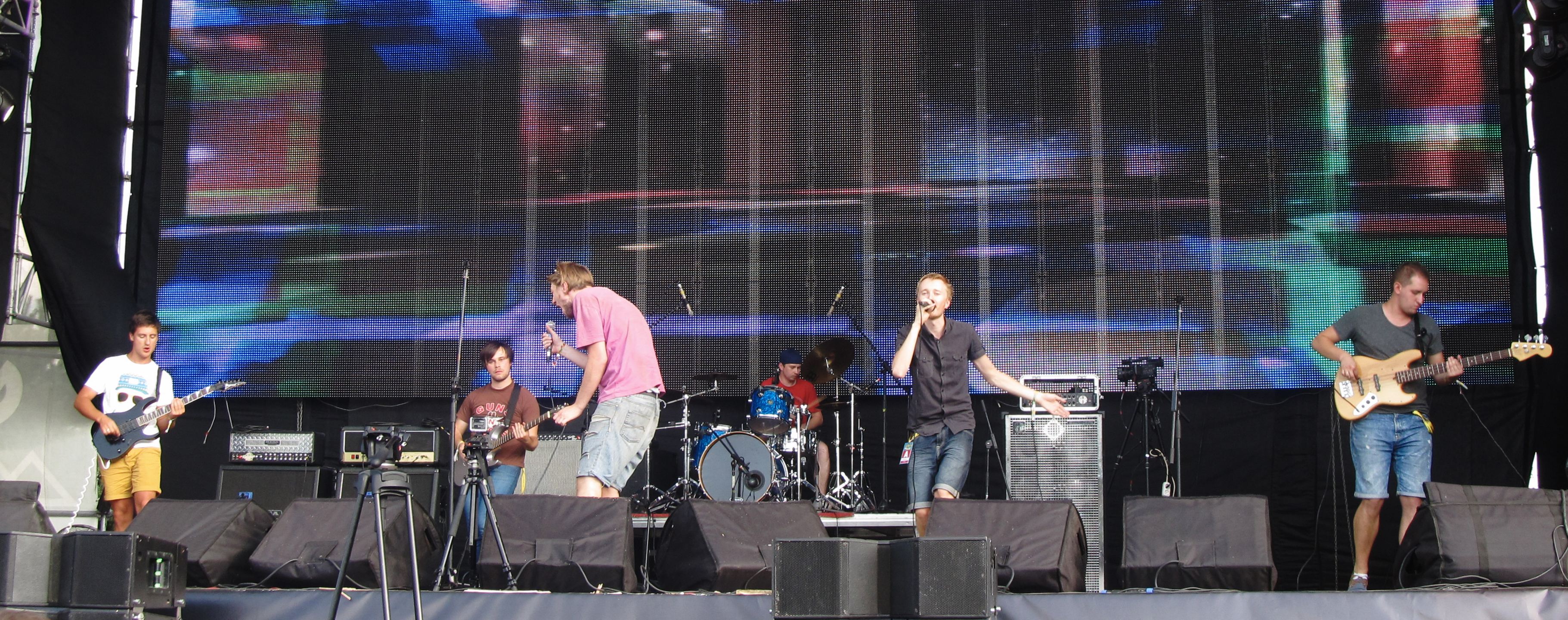 Гурт Dalai Lama на фестивалі Захід 2013